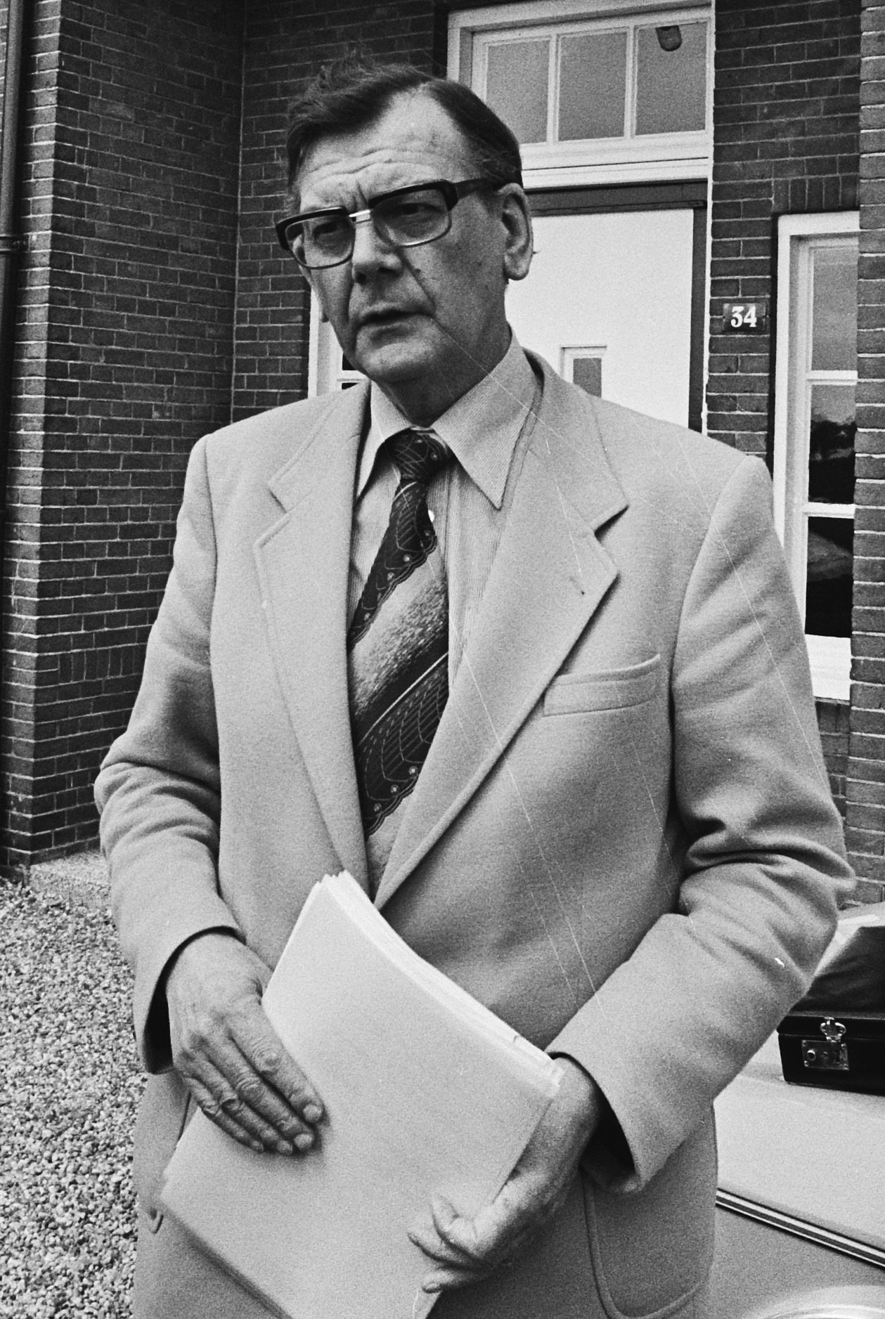 Poliovaccinatie in Elspeet; burgemeester van Elspeet houdt de pers weg bij het Kruisgebouw